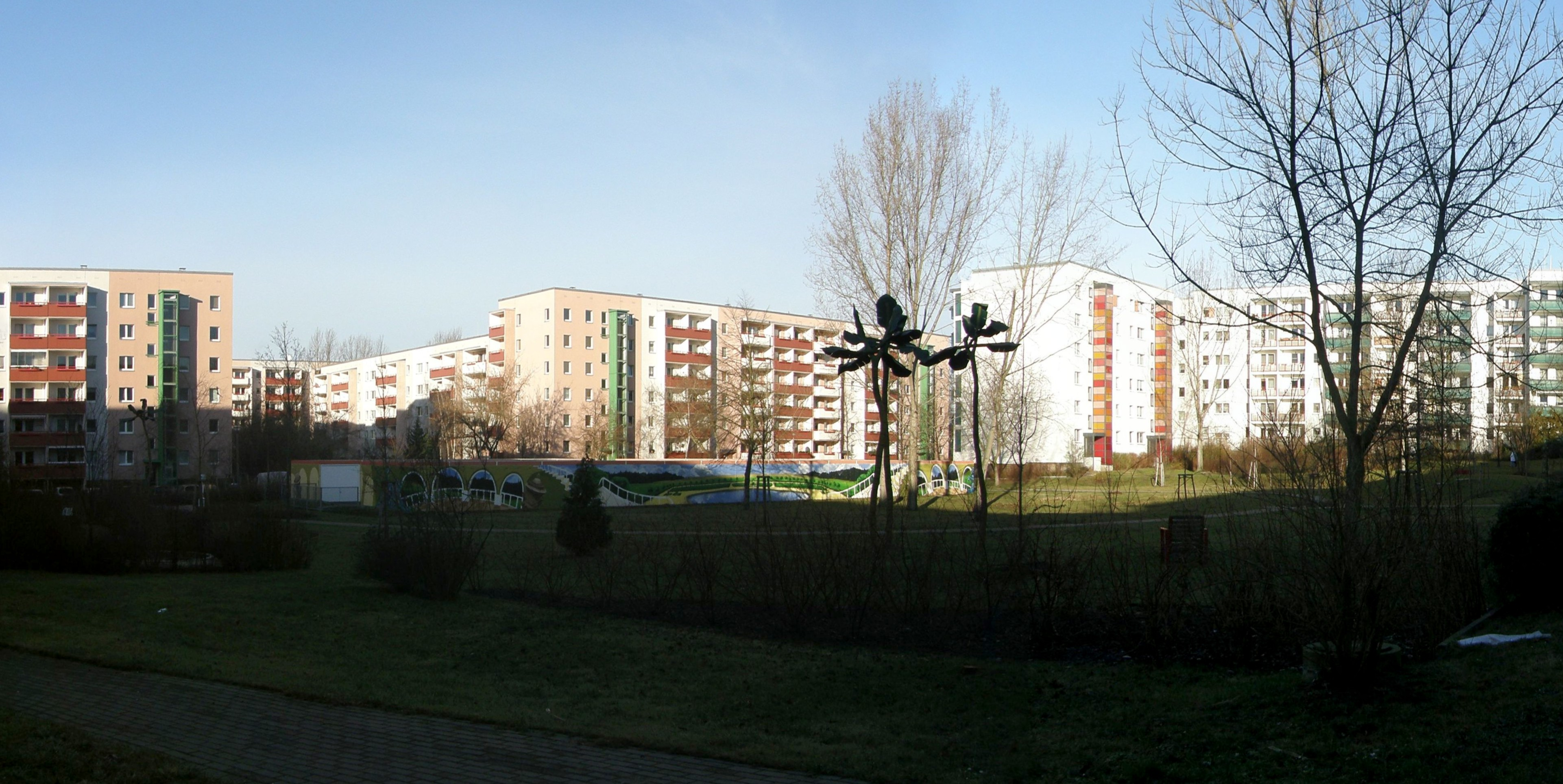 Berlin-Hellersdorf, Bodo-Uhse-Str., Stadtteilpark "Palmenhof"